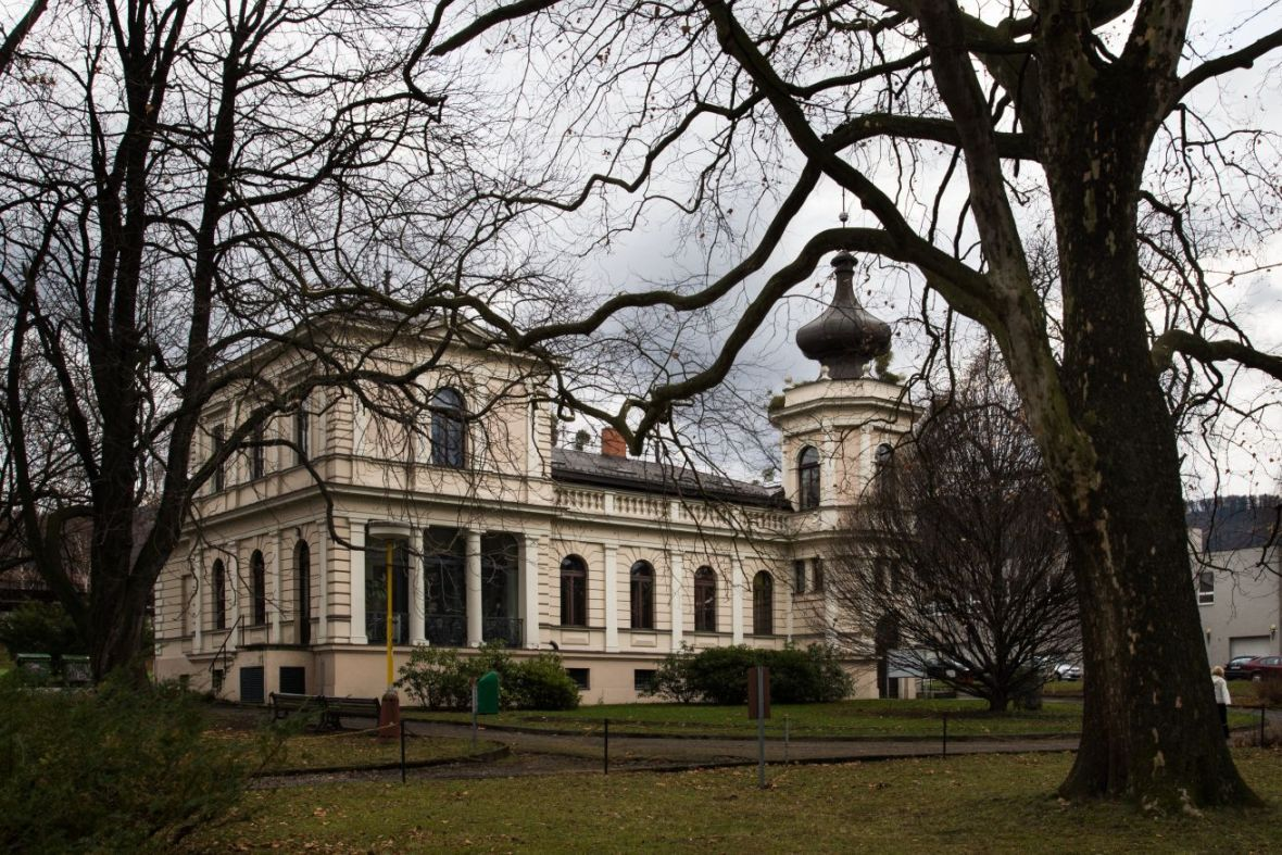 Objekt Šustalovy vily v Kopřivnici, ve kterém od roku 1947 sídlí Lašské muzeum.